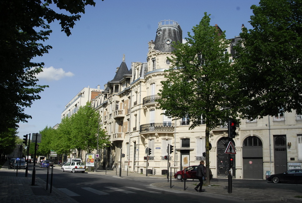 Boulevard Foch, à droite, rue de la Tirelire